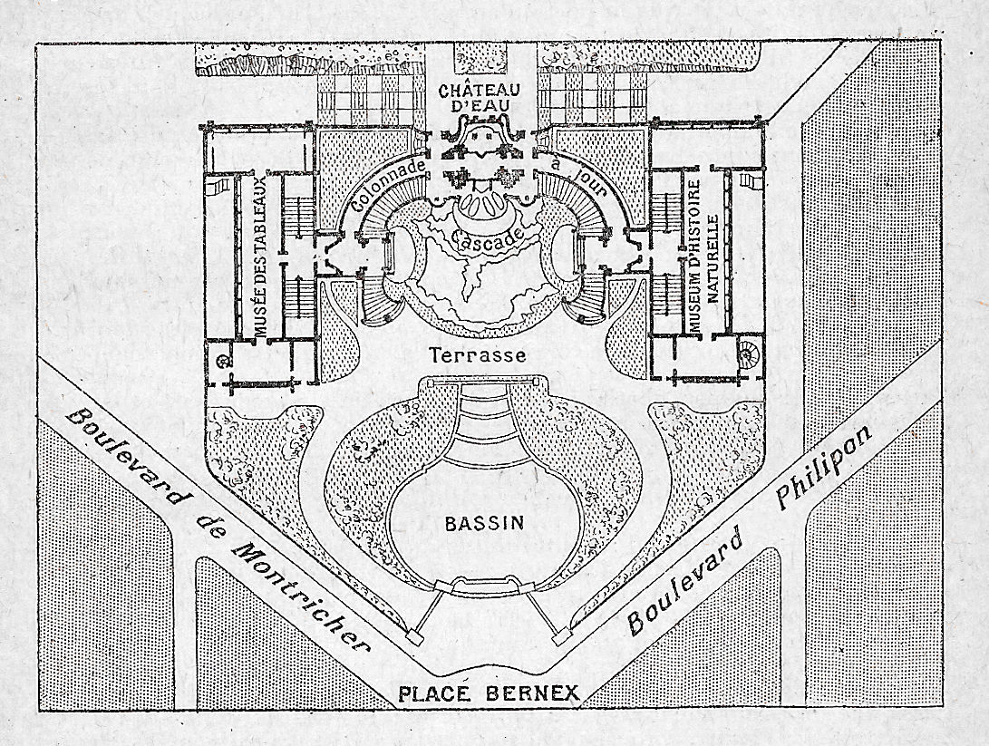 Carte de la Provence (1921) : Marseille, le Palais Longchamp